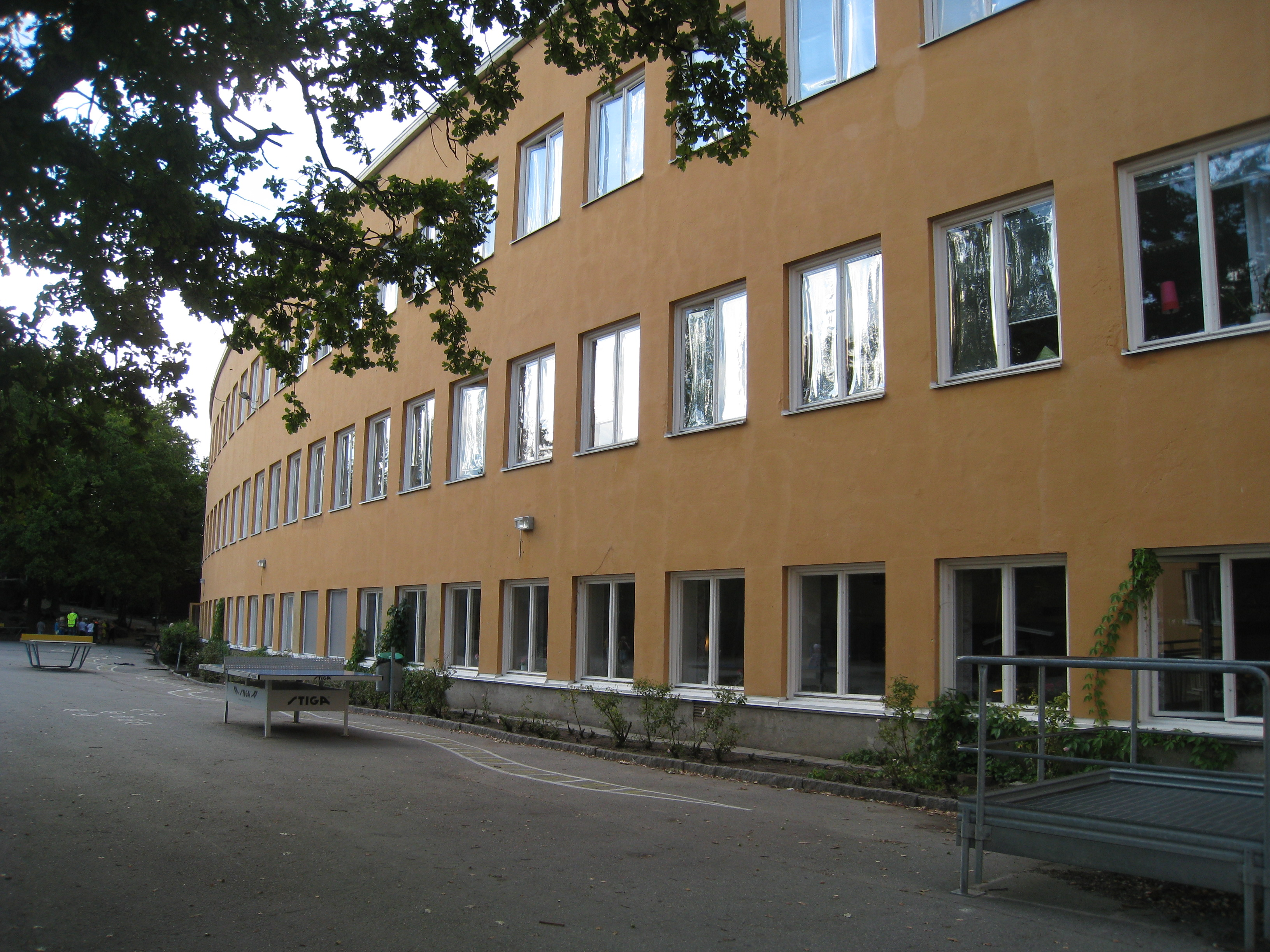 Olovslundsskolan på Gustav III:s väg 59-61 i Olovslund, Bromma. Skolan byggdes 1931 i en svängd form och ritades av arkitekt Paul Hedqvist (1895-1977). Vy över huvudbyggnaden och skolgården.